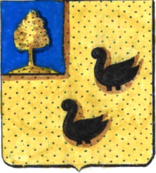 D'or, à deux merlettes de sable, au franc quartier d'azur, chargé d'un arbre d'or.